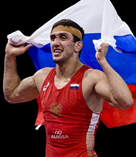 Российский борец вольного стиля Заурбек Сидаков